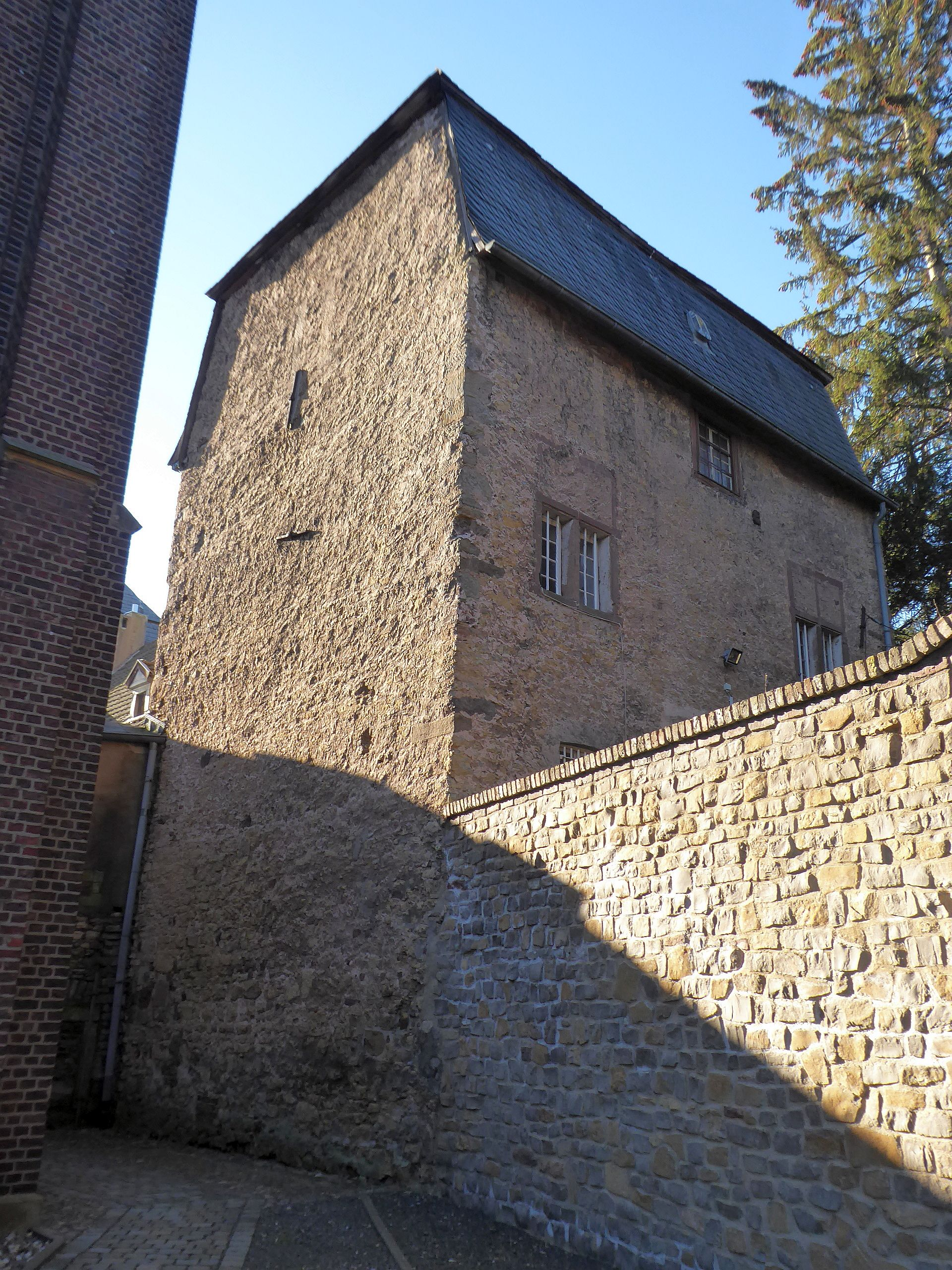 Burg Kommern, mittelalterlicher Wohnturm